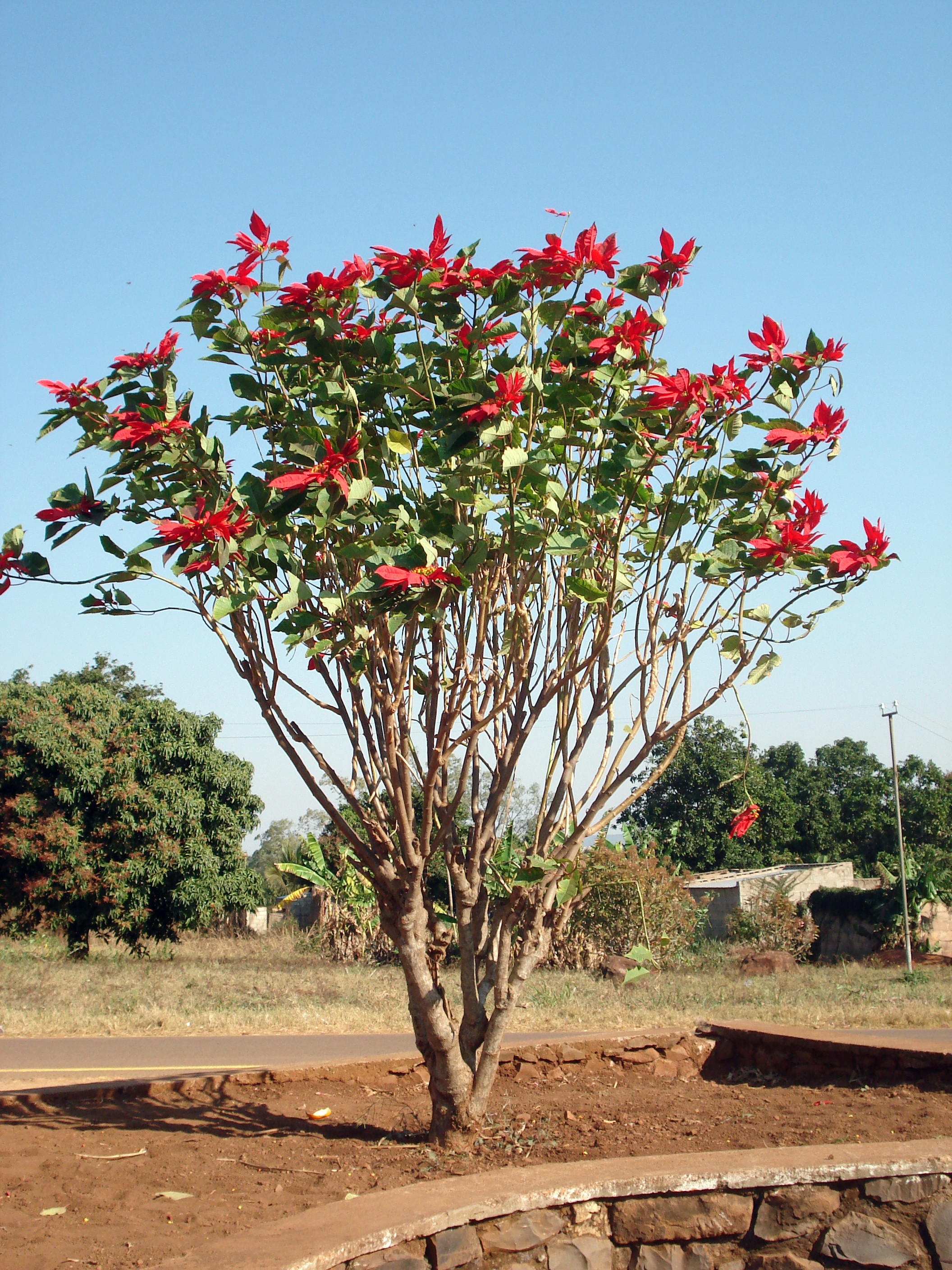 Božična zvezda v Afriki